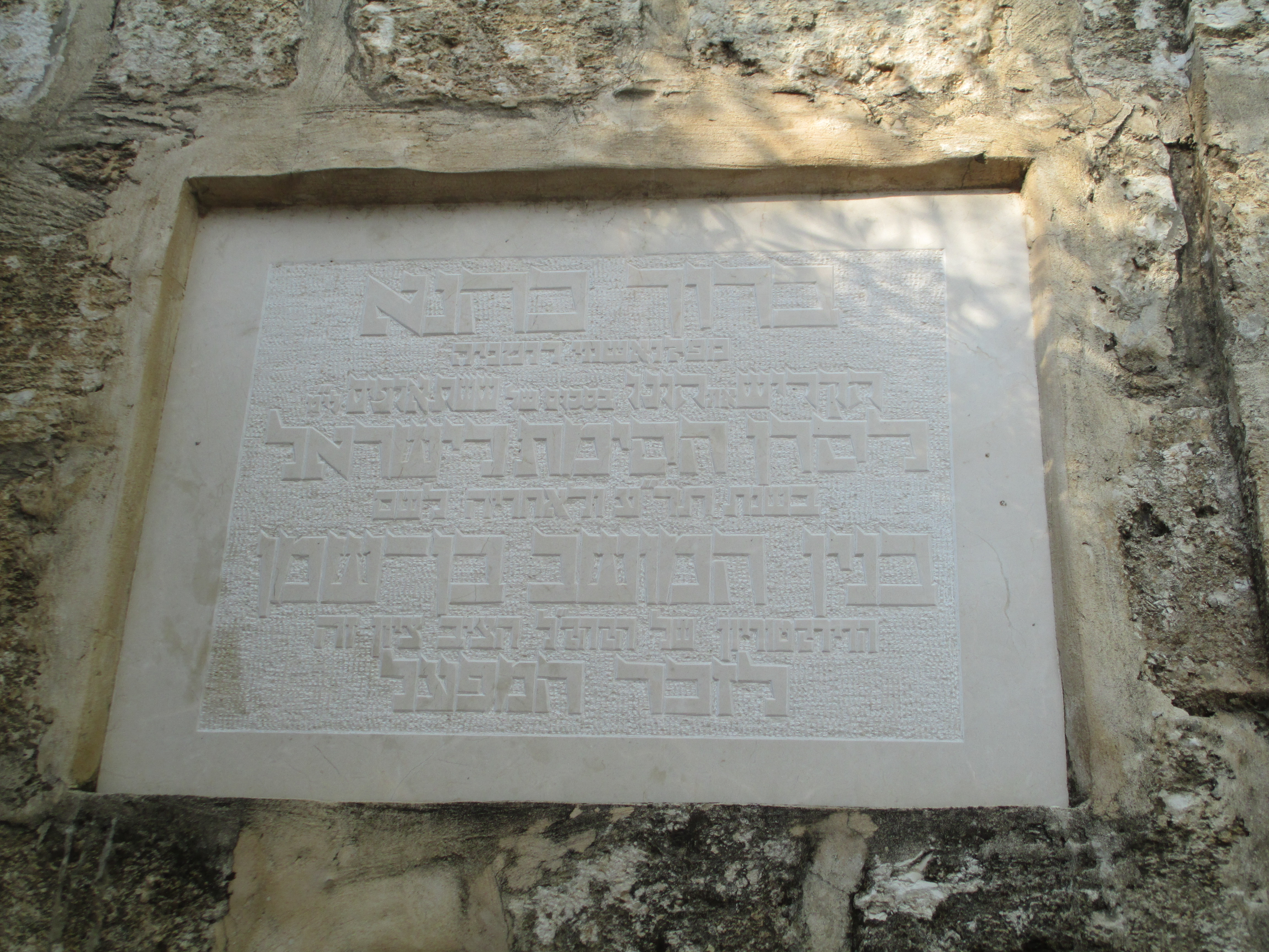 כתובת הקדשה לנדבן ברוך כהנא בכניסה לכפר הנוער בן שמן